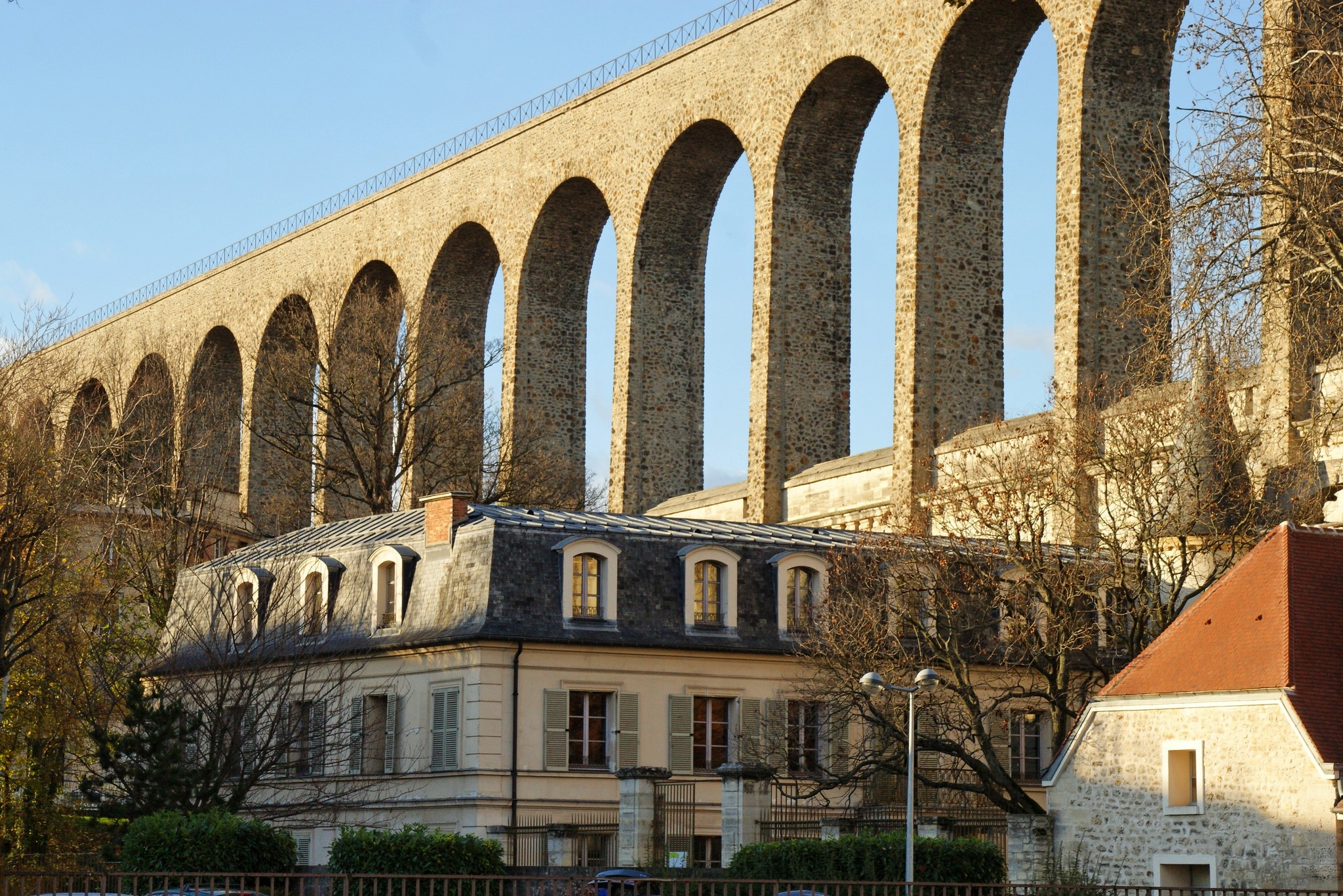 Aqueducs Médicis et Belgrand situé à Arcueil (94) séparant la commune d'arcueil de la commune de Cachan.